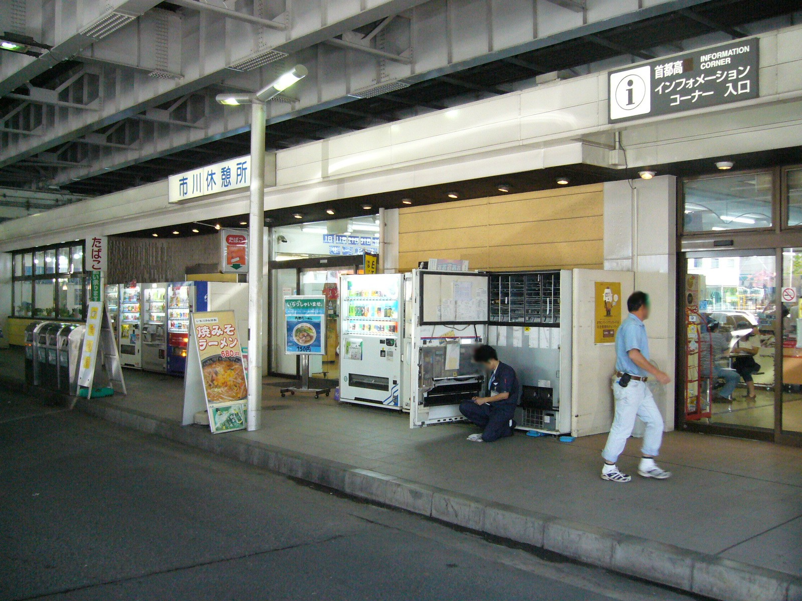 ichikawaP.A.-syutoko-expressway,ichikawa-city,japan